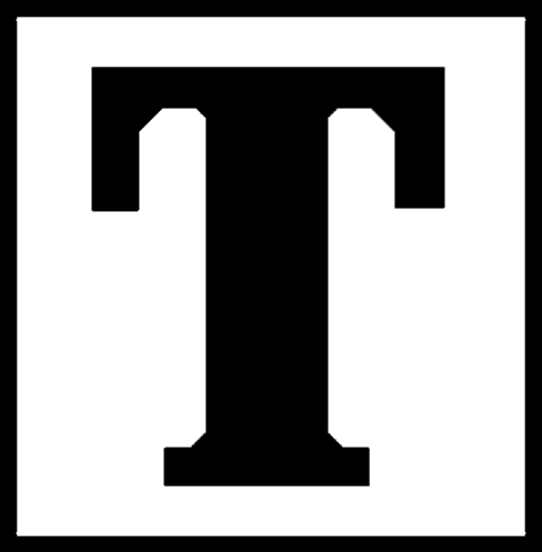 Logo von Tasmania Berlin in der Spielzeit 1965/66